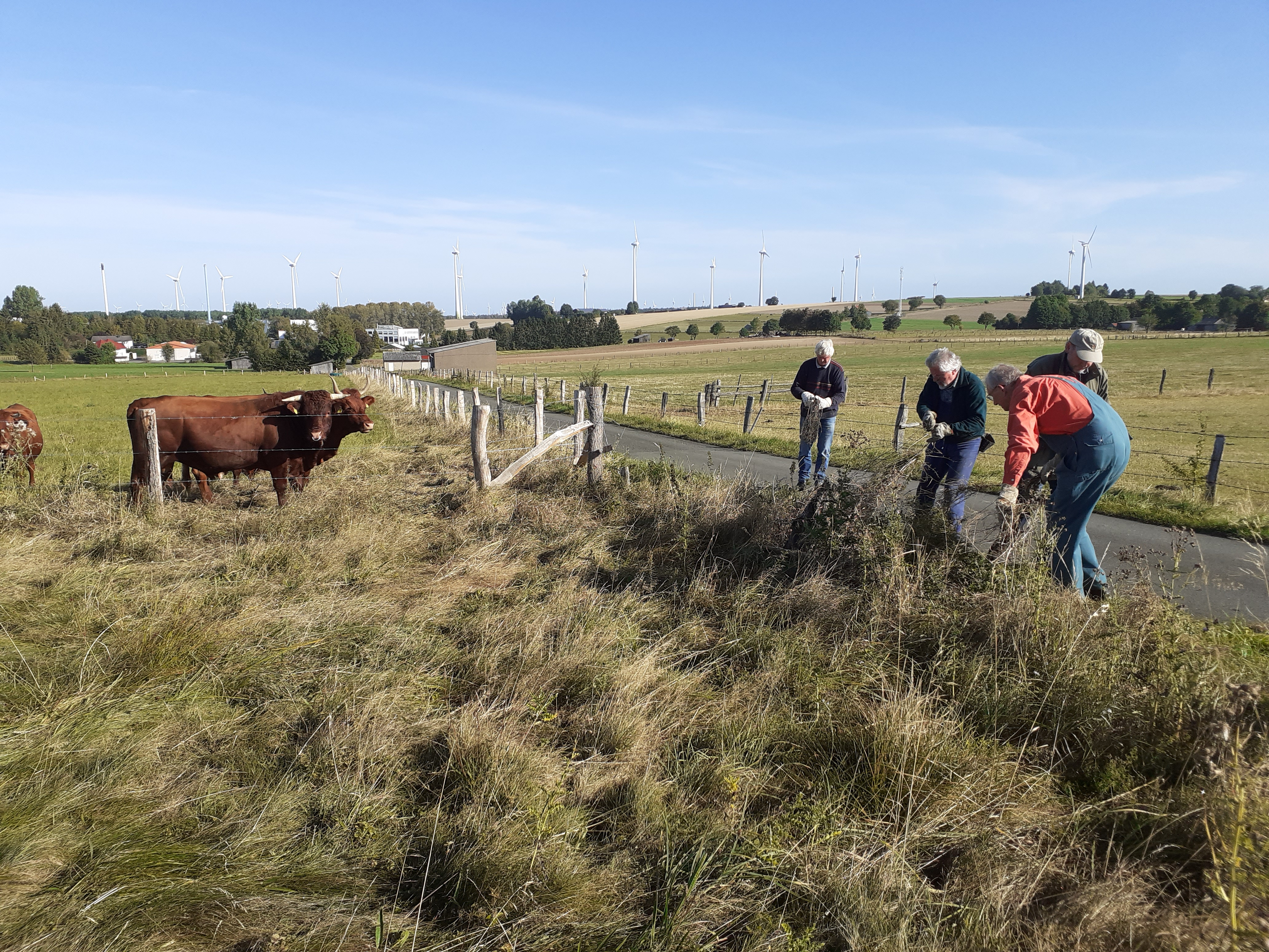 Arbeitseinsatz des Verein für Natur- und Vogelschutz im Hochsauerlandkreis (VNV) im NSG Auf dem Bruch (links des Weges). Alter Zaun wird abgebaut. Links vereinseigenen Rotem Höhenvieh auf Pachtfläche des VNV. Rechts des Weges und im Hintergrund das Landschaftsschutzgebiet Paderborner Hochfläche.